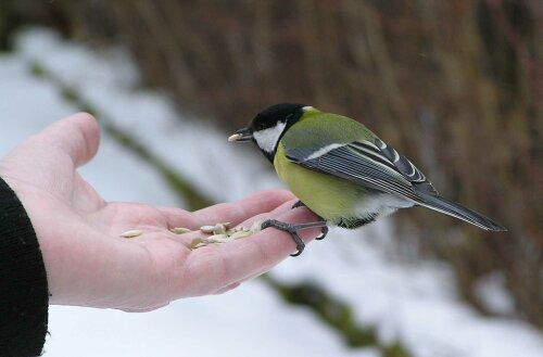 Parus major